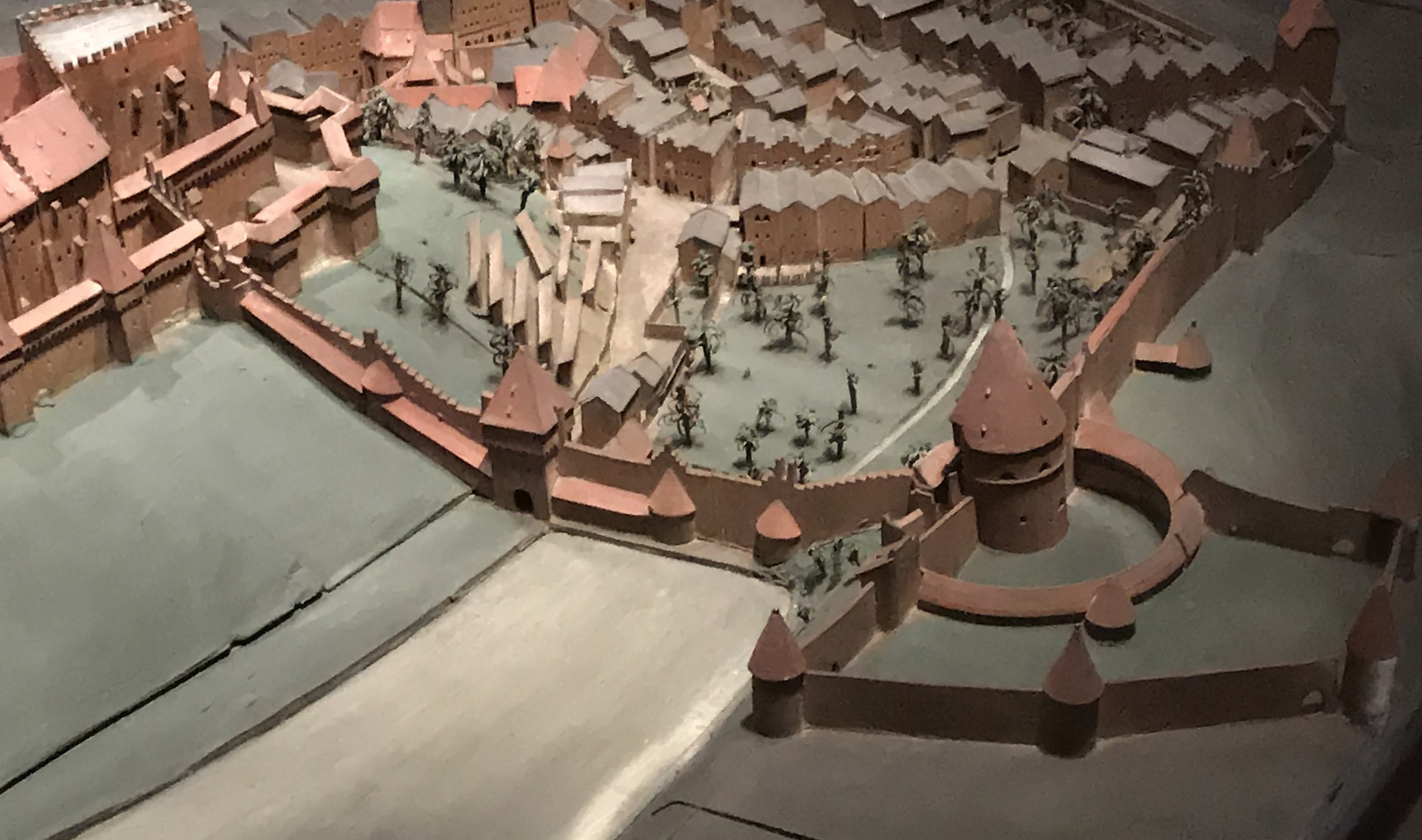 Pulverturm und Wöhrturm auf dem Modell von Burghausen von Jakob Sandtner (1574) im Bayerischen Nationalmuseum